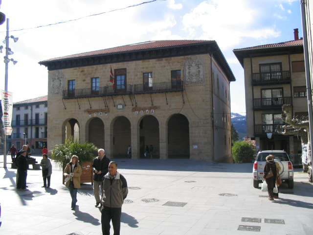 Ville d'Oiartzun en (Gipuzkoa) (Espagne).